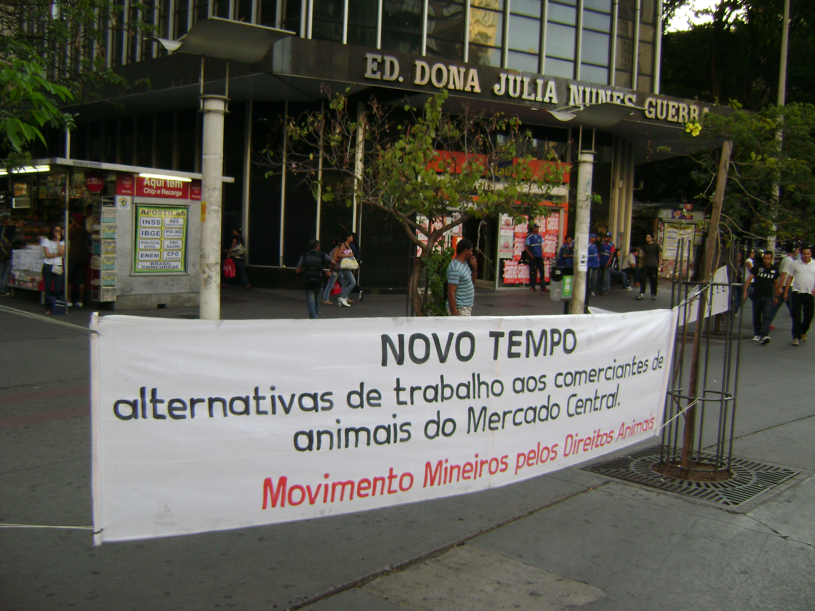 Cartaz na Praça Sete de Setembro criticando a venda de animais no Mercado Central, em Belo Horizonte, Brasil.